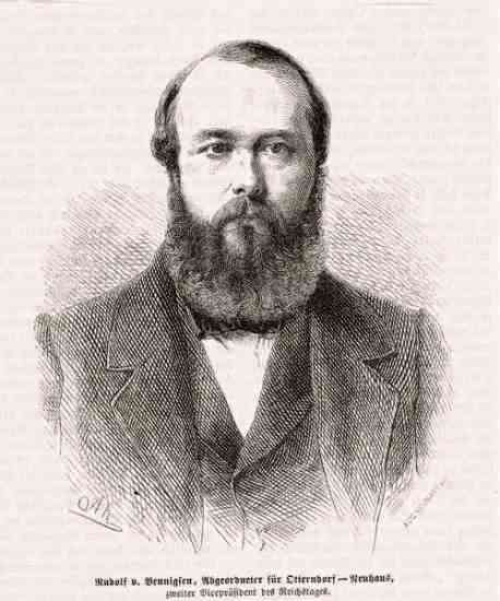 Rudolf von Bennigsen (Holzstich um 1871, Stecher Adolf Neumann)